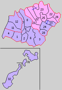 後の鹿児島県薩摩郡域の町村制時点の町村。